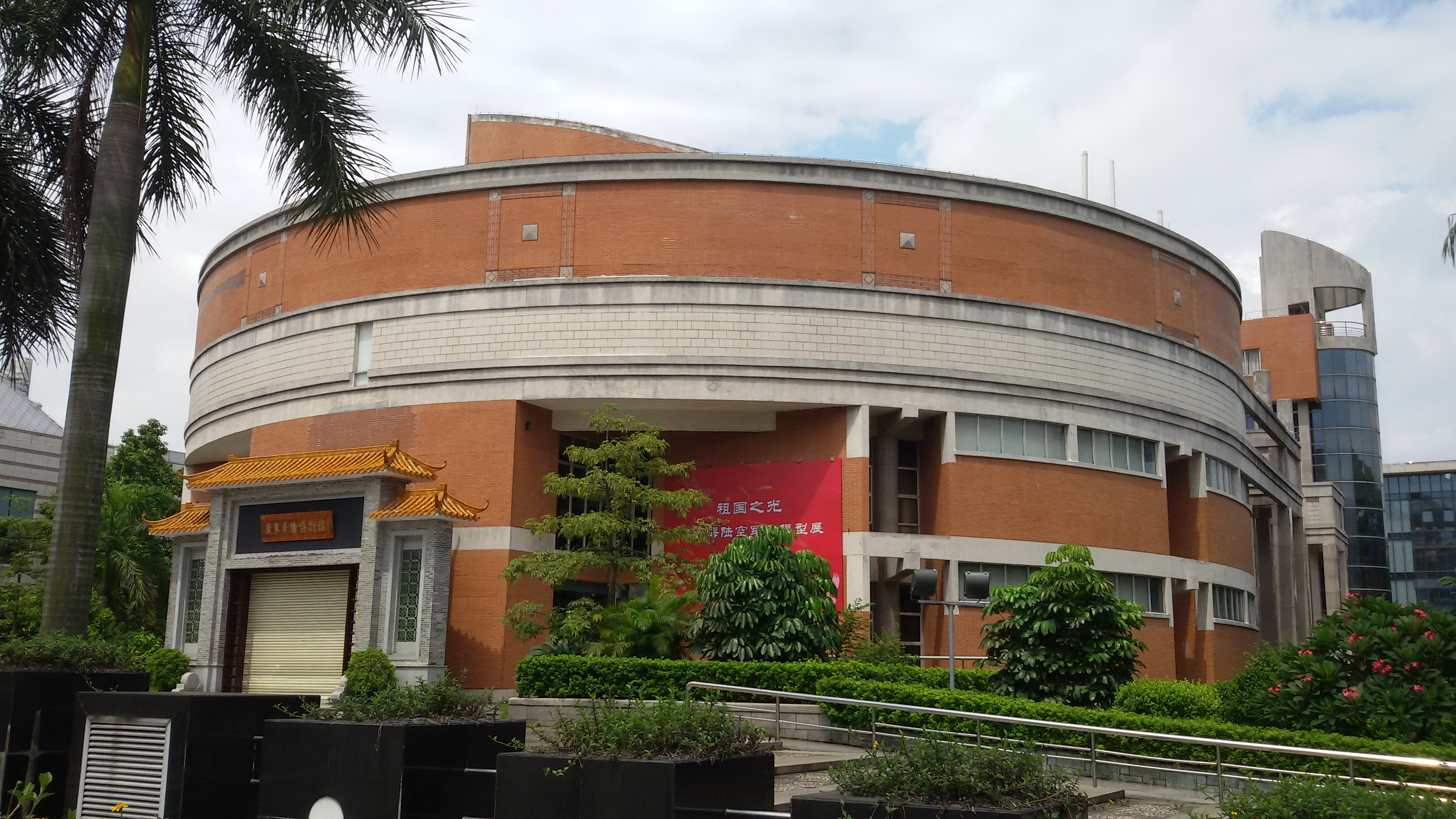 粵語: 廣東華僑博物館